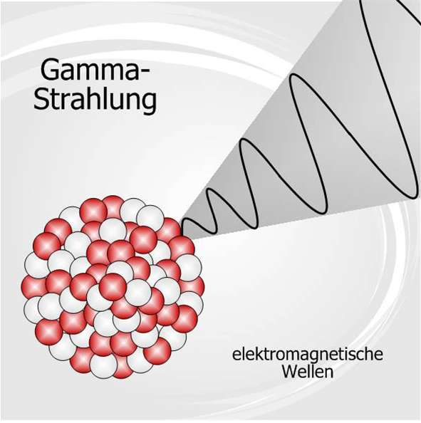 Gammastrahlung